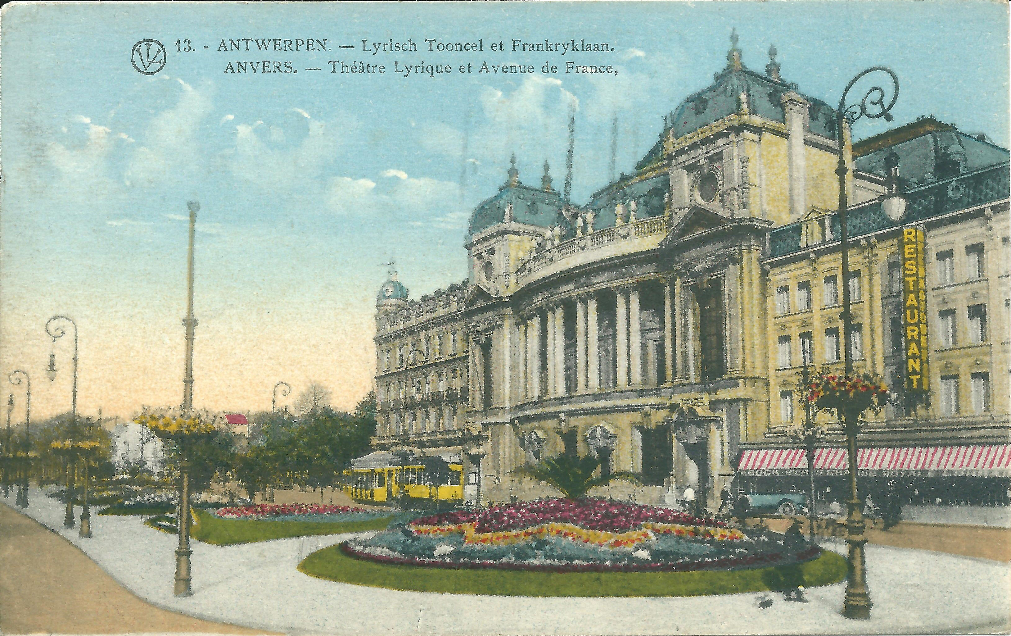 Kleur briefkaart van de Opera in Antwerpen gepost in 1933